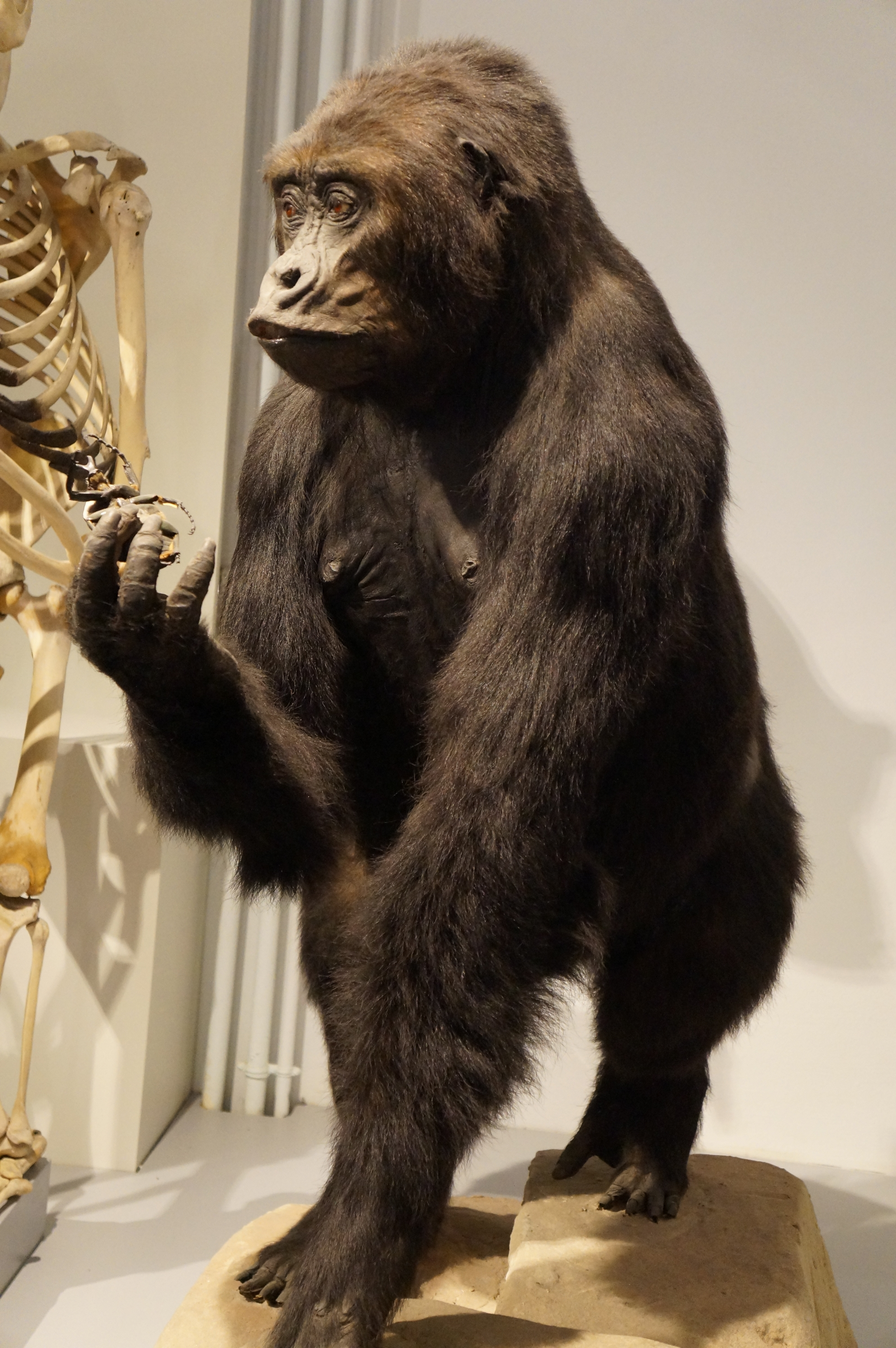 gorilla beringei graueri